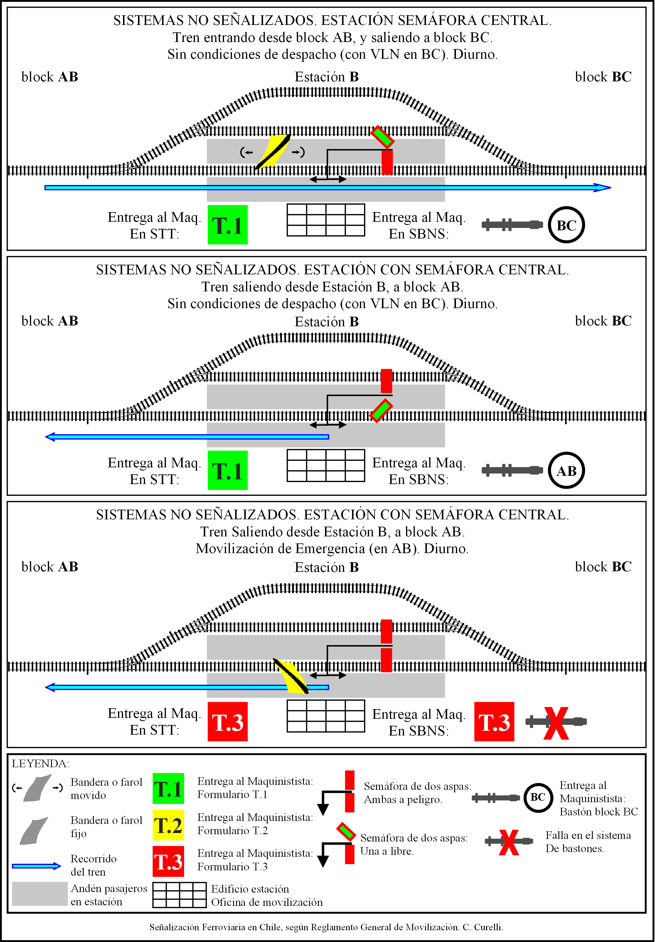 Esquema estaciones no señalizadas, con semáfora central. Reglamento General de Movilización. Ferrocarriles del Estado (Chile).